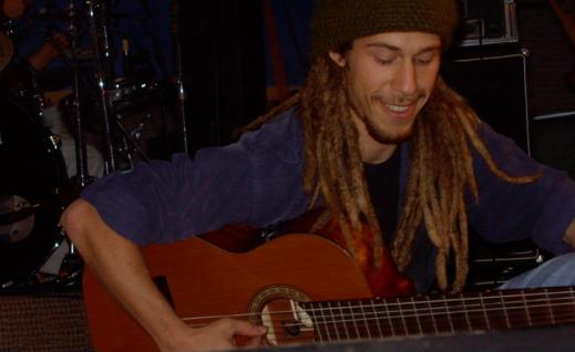 Jahcoustix beim Reggae Jam 2005